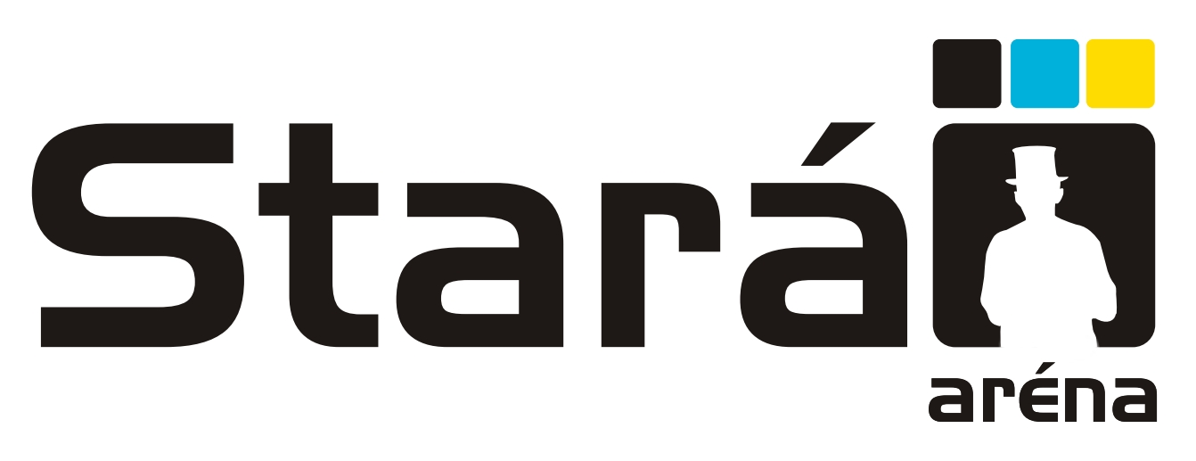 logo klubu Stará Aréna